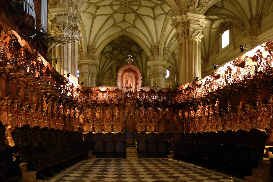 Catedral de Guadix, Andalucía, España.